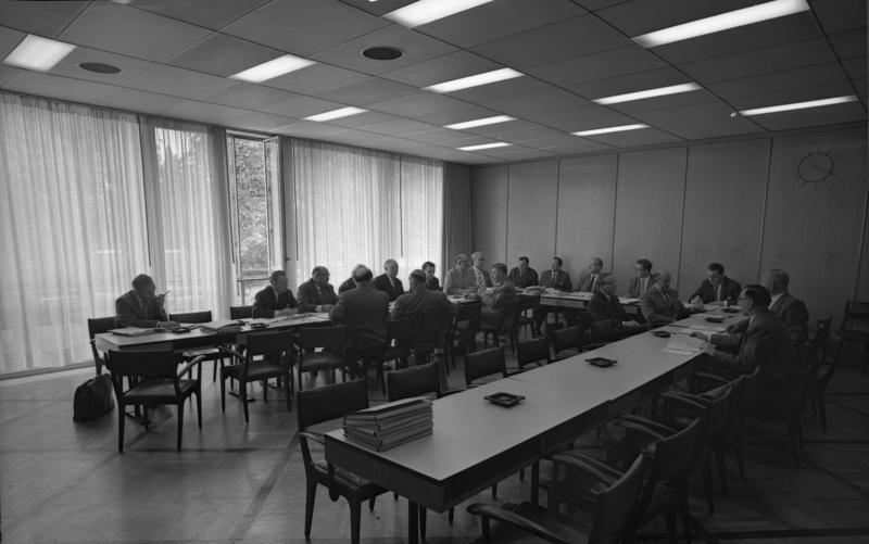 Ausschuß für Mittelstandsfragen Bundeshaus Bonn